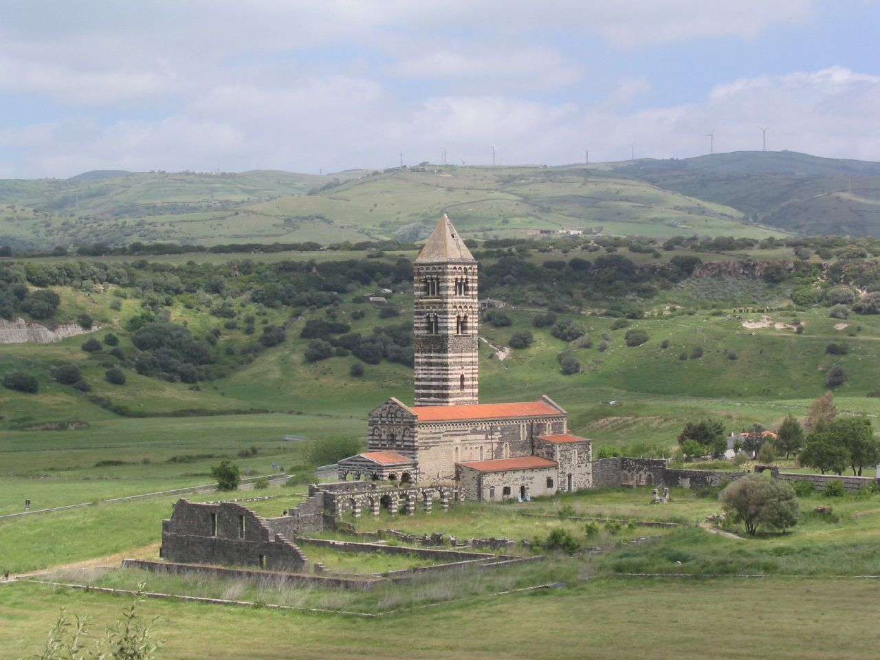 Codrongianos, Sardegna, Italia